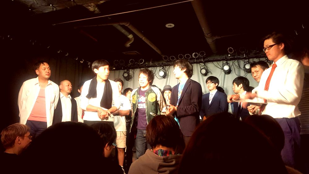 20161016びーちぶED